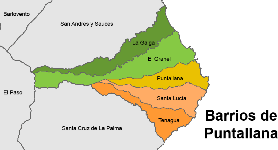 Mapa Barrios de Puntallana